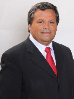 Luis Segundo Lemus Aracena